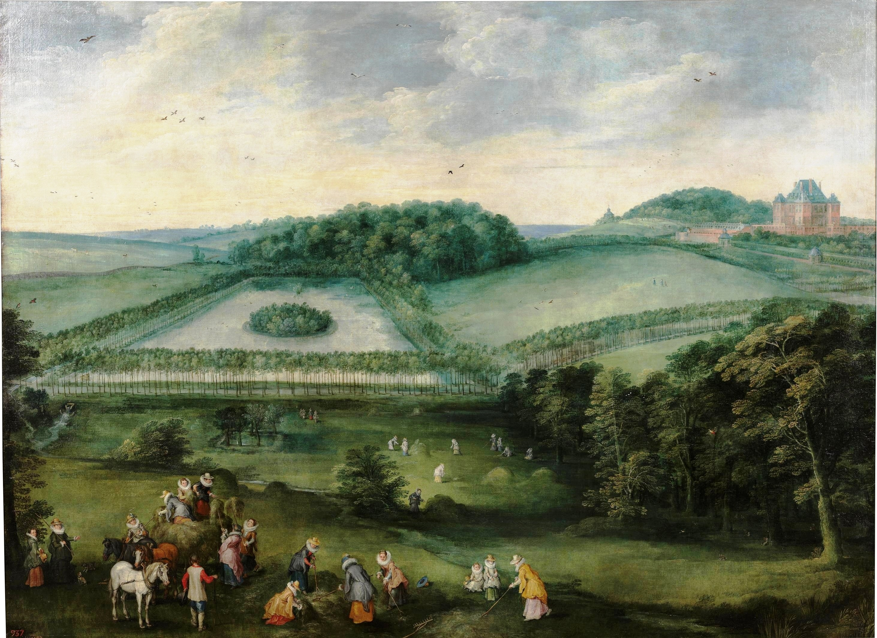 La obra muestra a la infanta Isabel Clara Eugenia (1566-1633), que fue hija del rey Felipe II de España, esposa del archiduque Alberto de Austria y también soberana y posteriormente gobernadora de los Países Bajos, durante una excursion al campo.